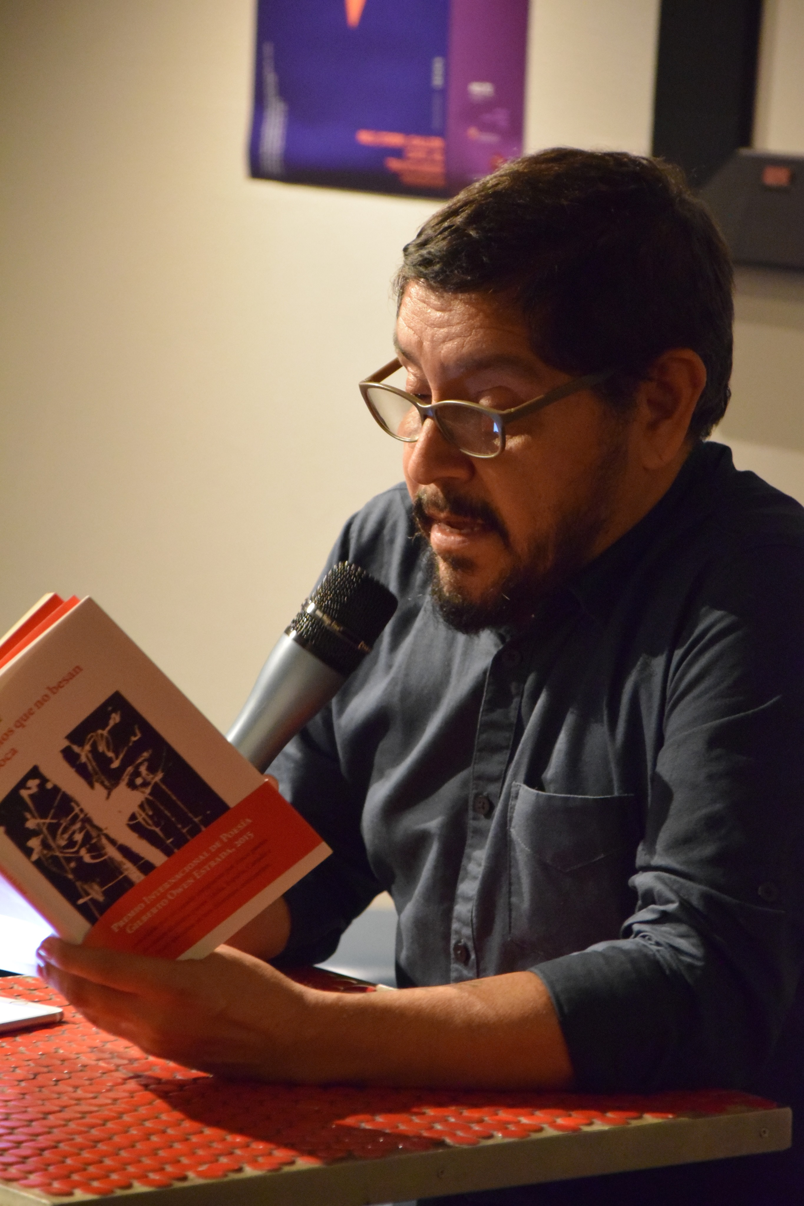 Luis Aguilar (escritor)